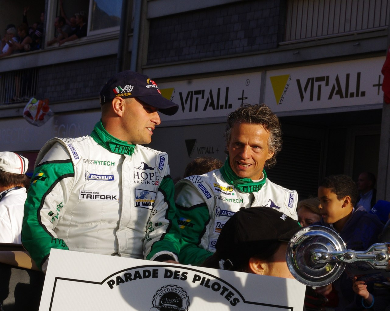 Le Mans 24 Hours 2011 Drivers' Parade